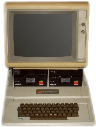 Apple II aus meinem Besitz